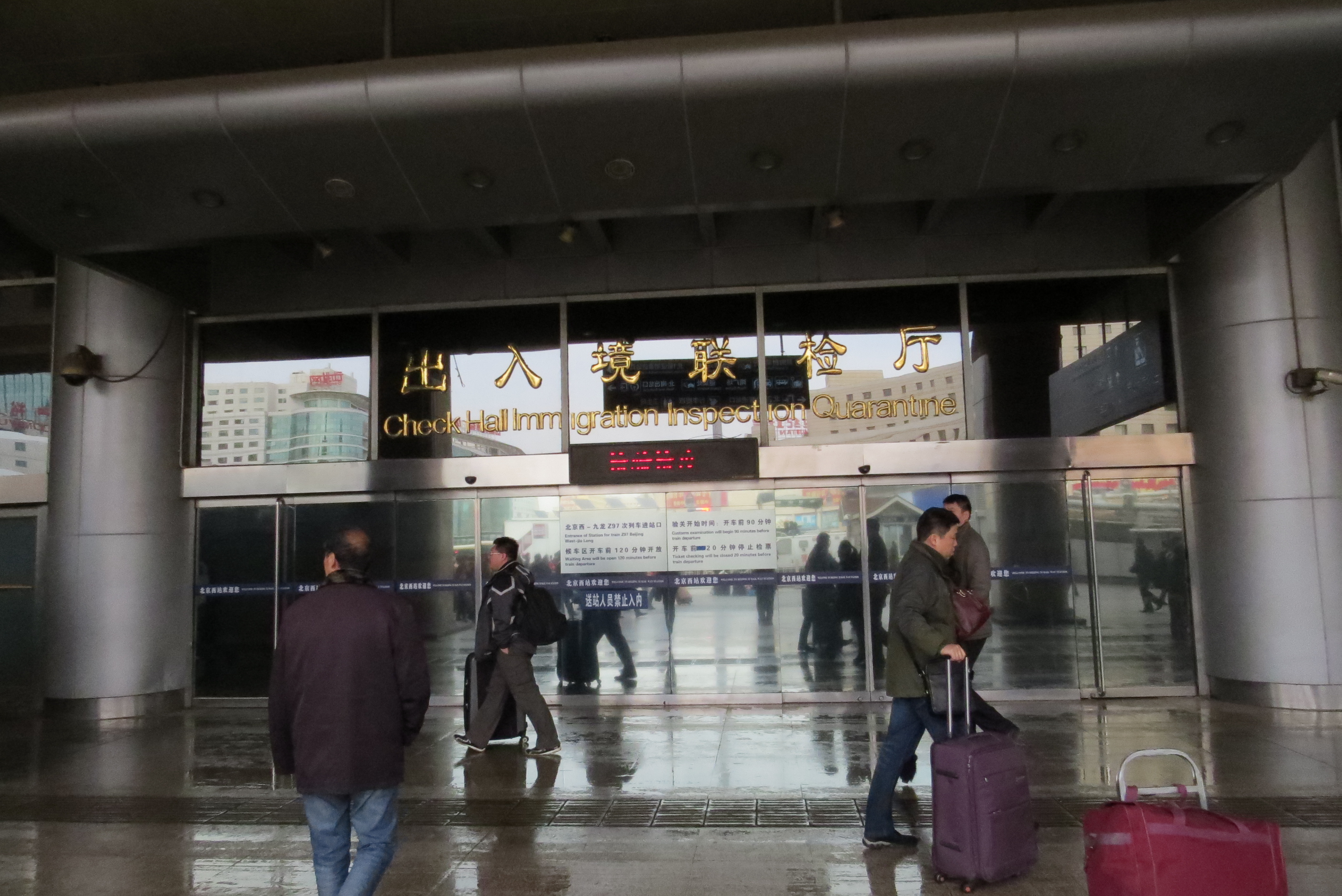 北京西站出入境联检厅（供Z97次列车乘客使用）